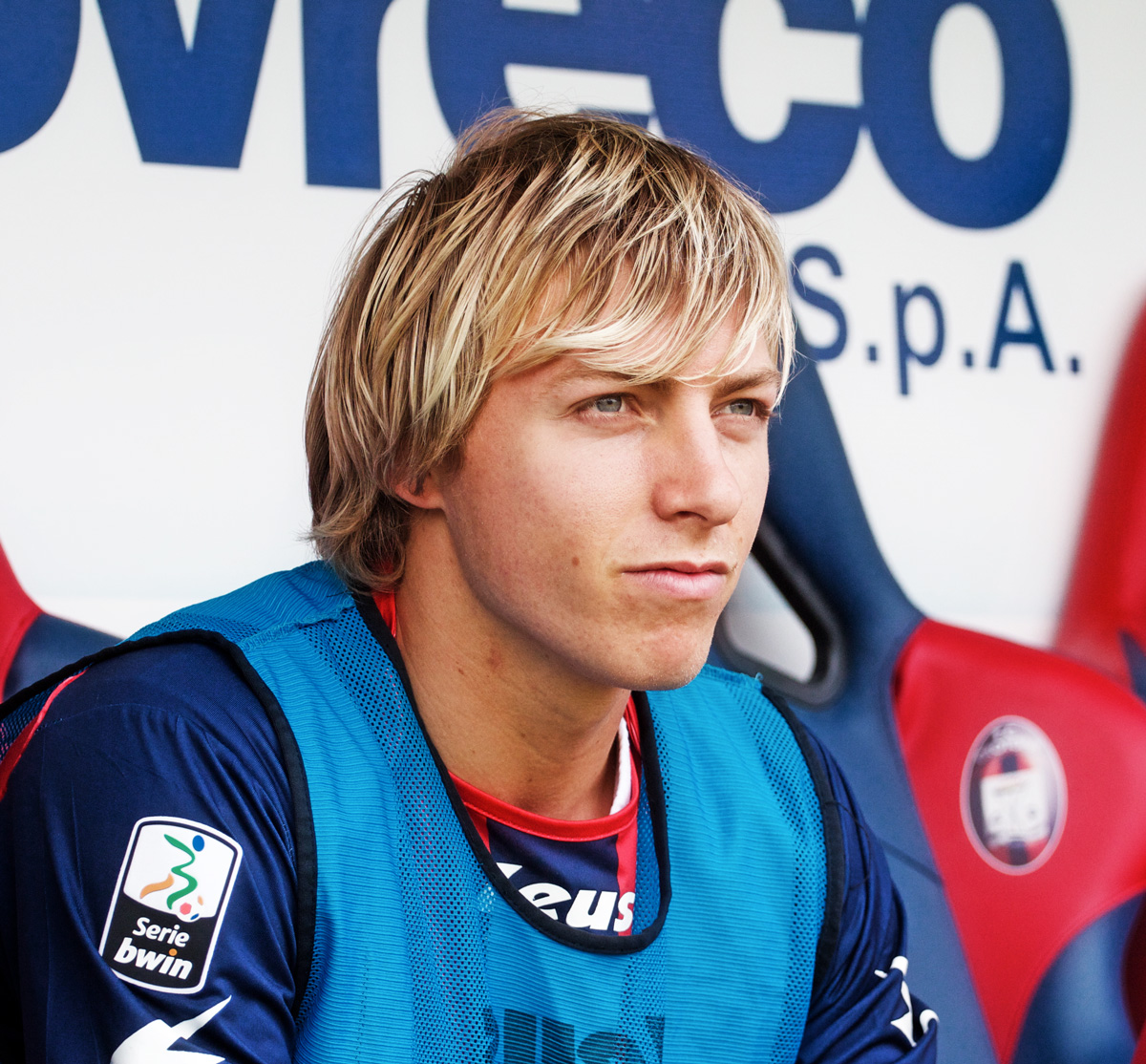 Primo piano di Alessandro Crescenzi